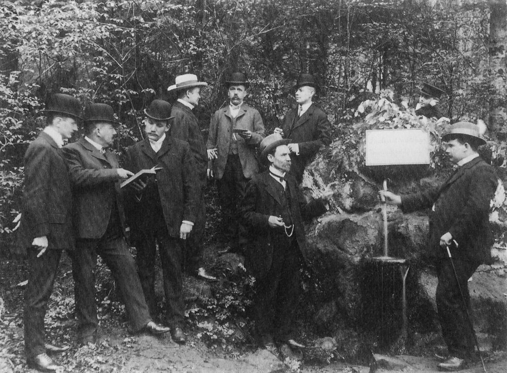 Arbeiter-Ausschuss der Firma Reiniger, Gebbert & Schall in Erlangen. Dritter von links: Paul Ritzer (1870-1951), Mitgründer des Deutschen Metallarbeiter-Verbandes, des Vorgängers der IG Metall.